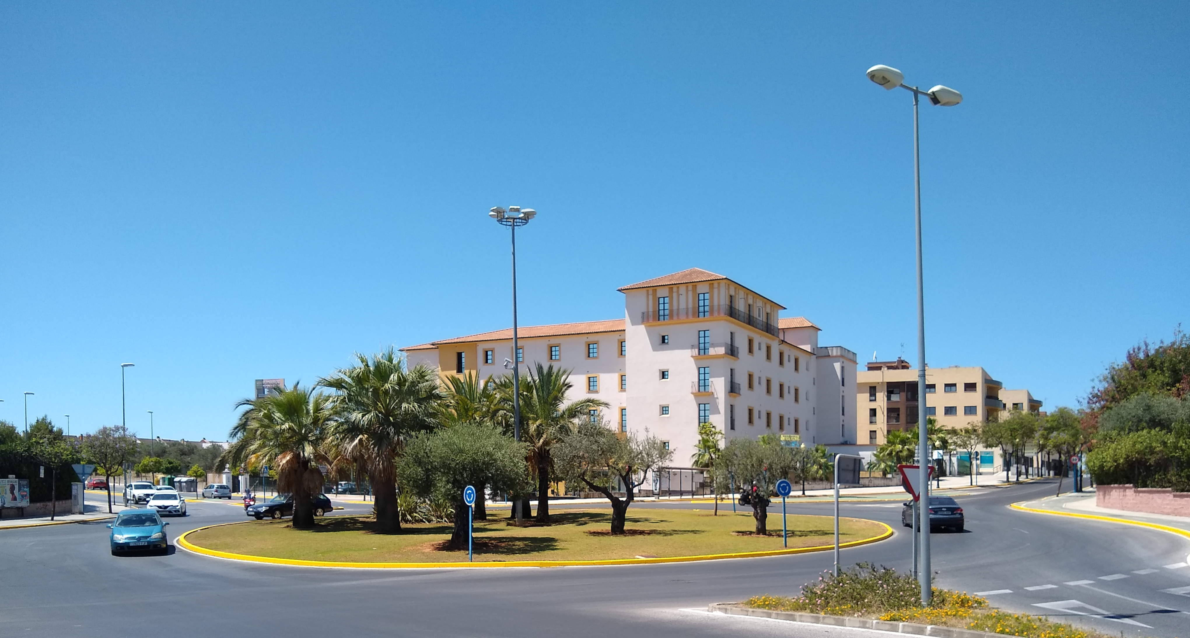 Mairena del Aljarafe. Provincia de Sevilla, Andalucía, España.